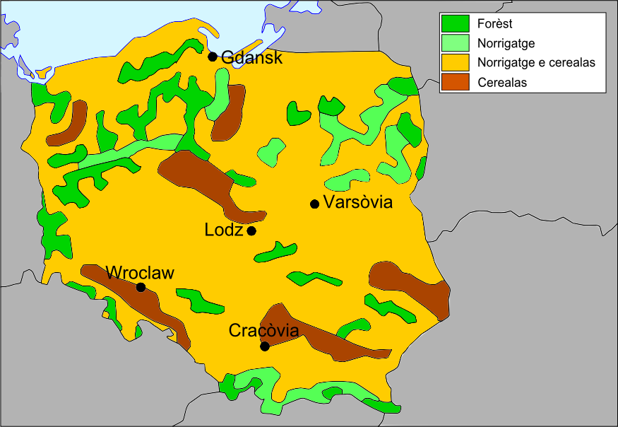 Esquèma generau de l'agricultura polonesa.